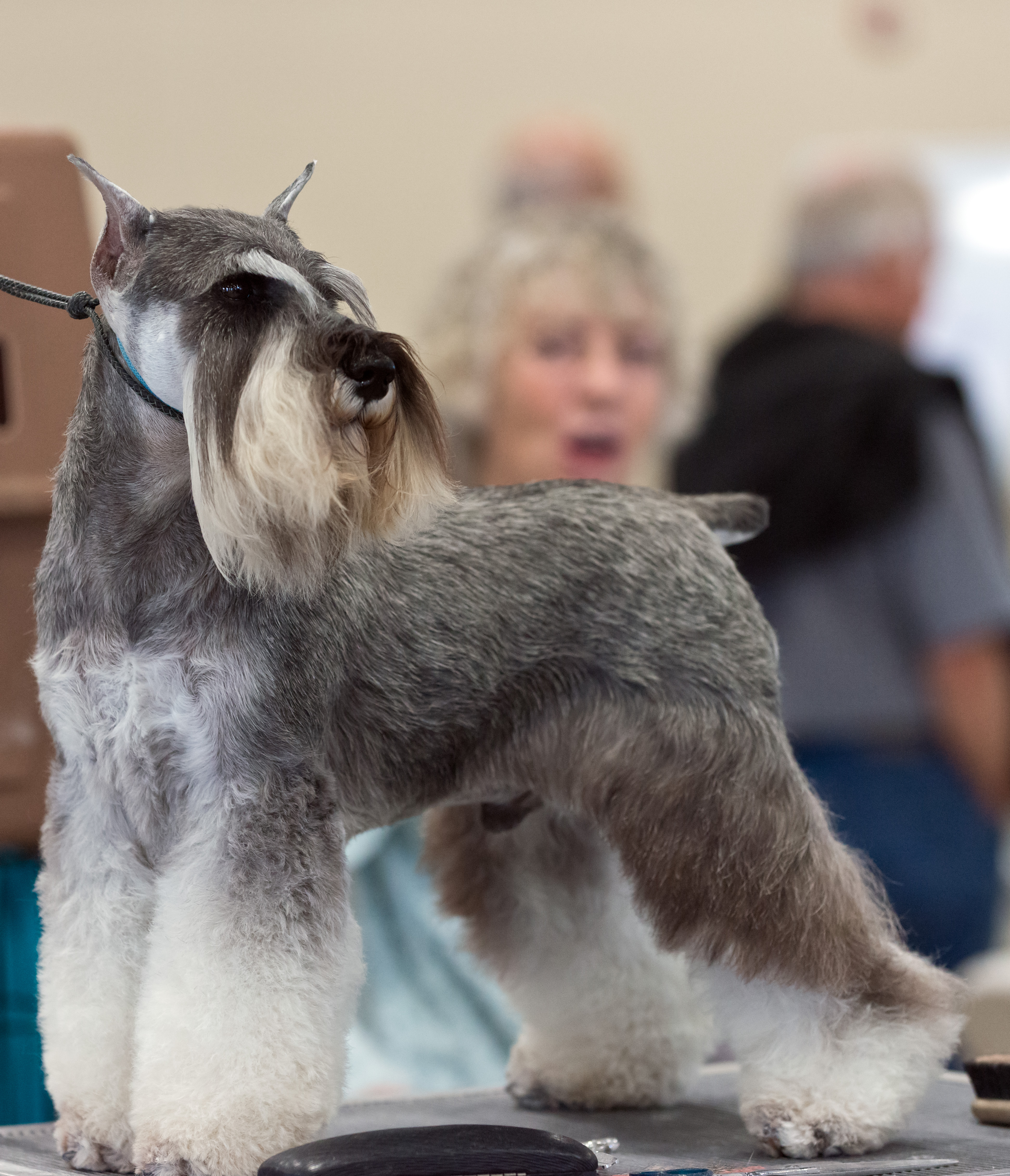 Miniature Schnauzer